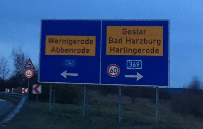 provisorische Beschilderung am Autobahndreieck Vienenburg, 27. Dezember 2018.